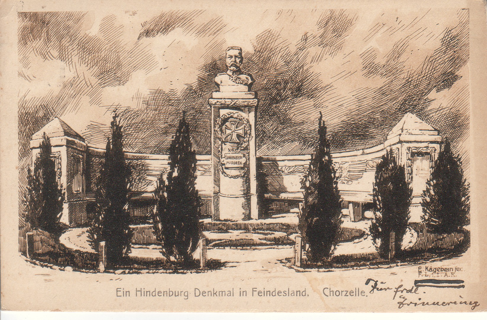 Ein Hindenburg-Denkmal in Feindesland. Chorzele.